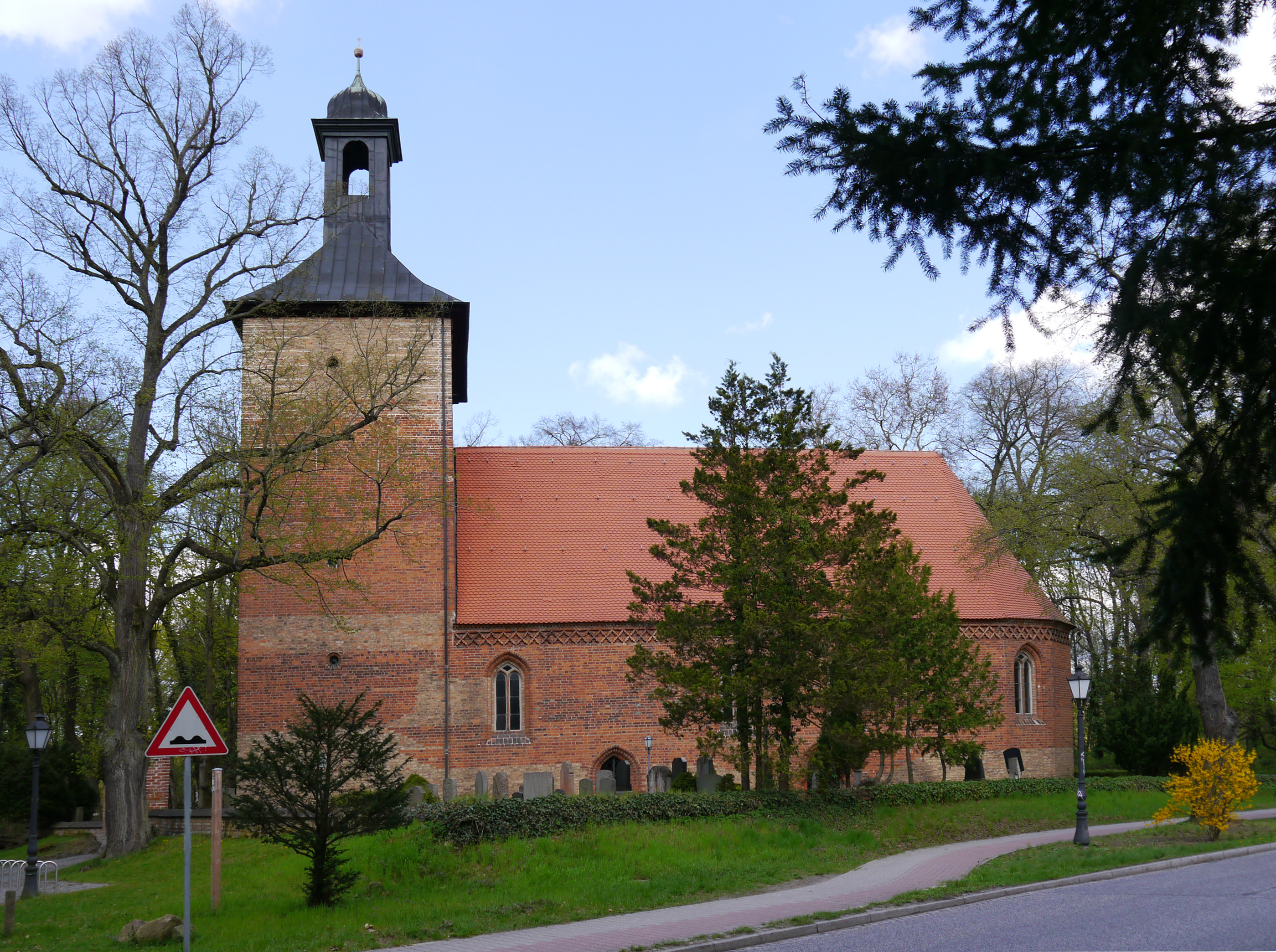 Baudenkmal: Dorfkirche Kleinmachnow, Zehlendorfer Damm